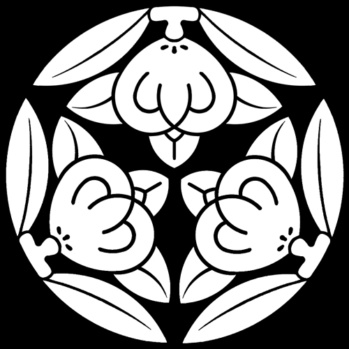 「三つ橘」紋（染抜）